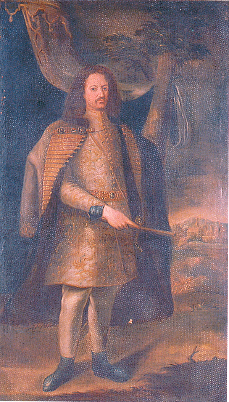 Batthyány Ádám országbíró, a Dunántúli hadak főgenerálisa.